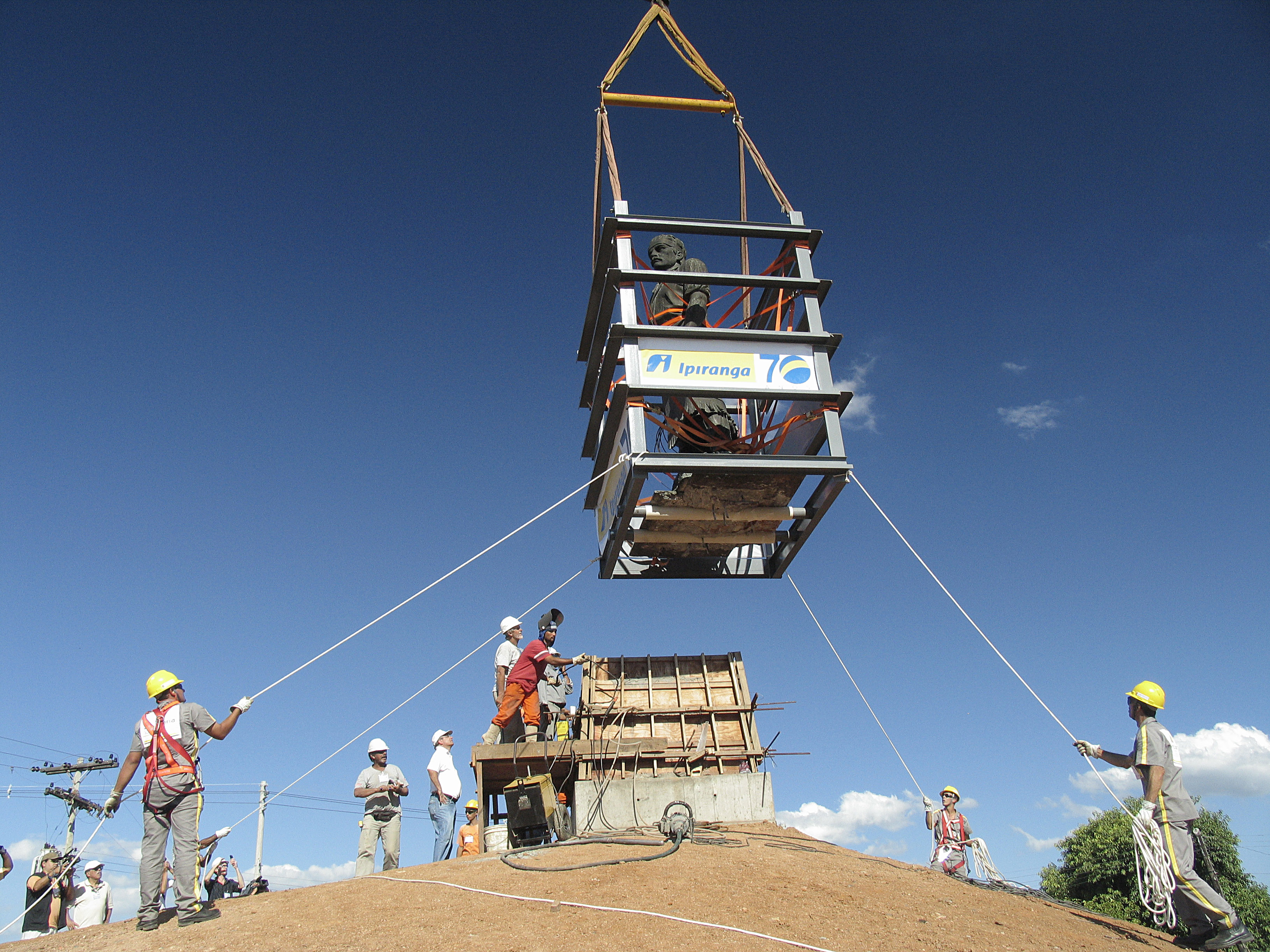 Instalação da estátua do Laçador em seu novo lugar, em 11 de março de 2007.